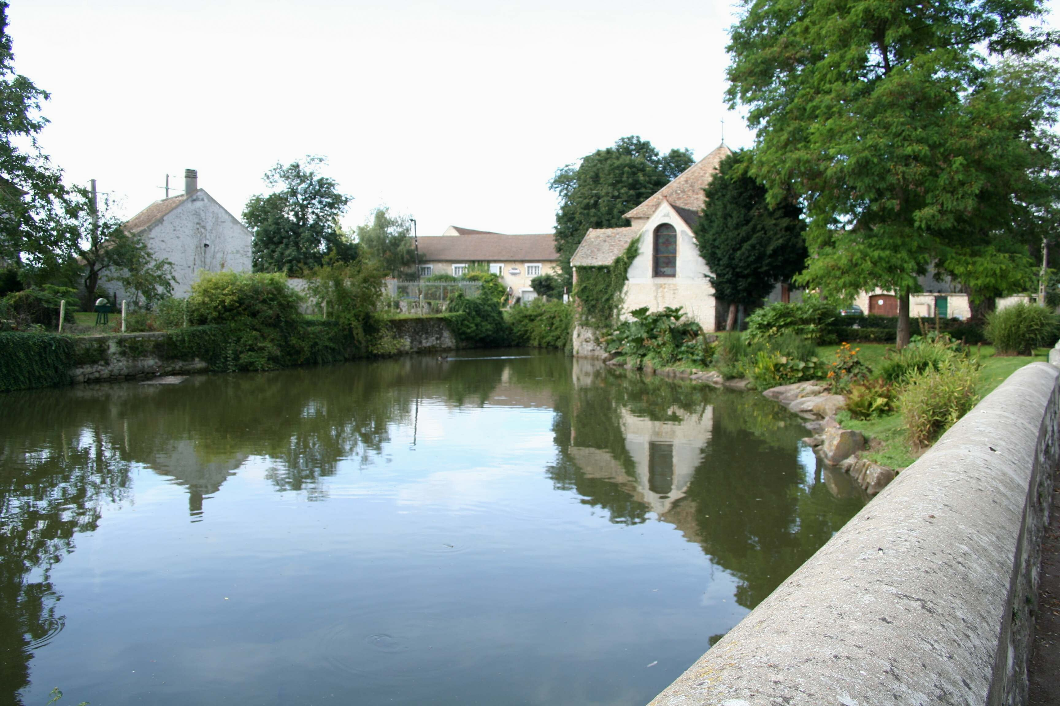 Mare à Andelu, Yvelines (France)